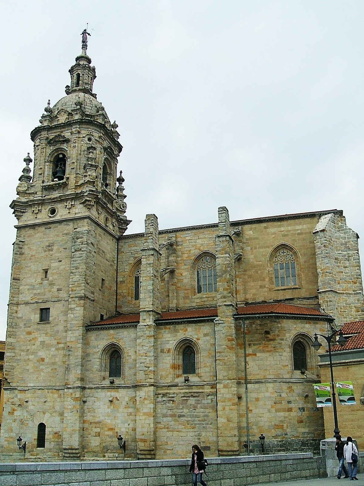 San Anton eliza, Bilbo.